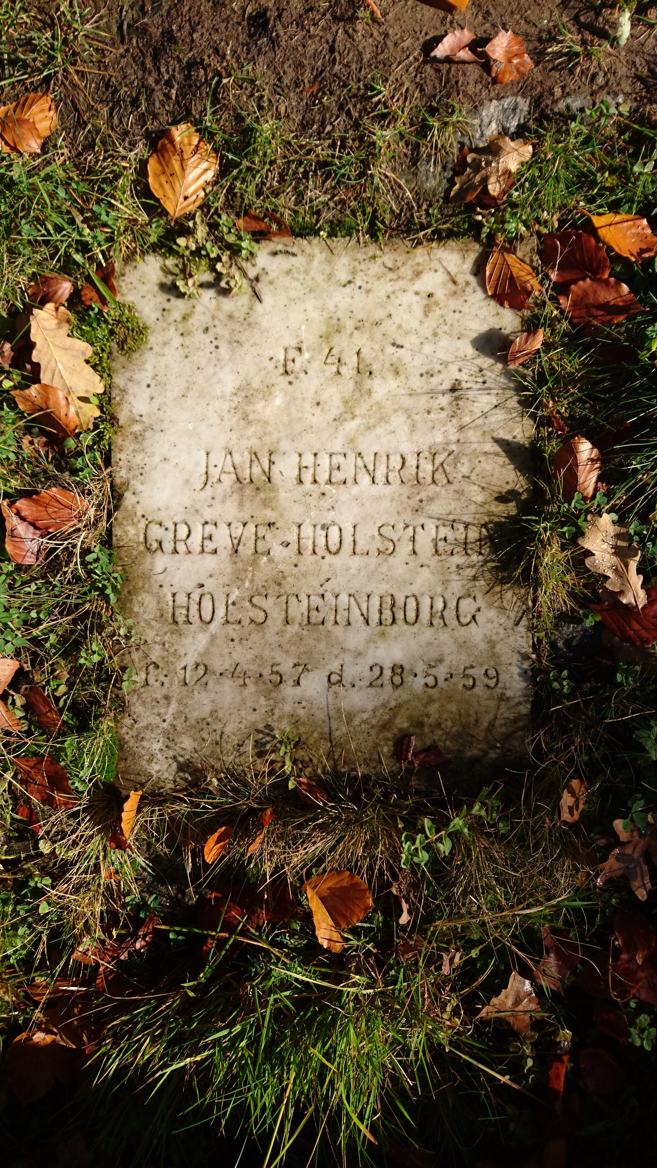 Greve begravet ved Ebberødgårds Kapel